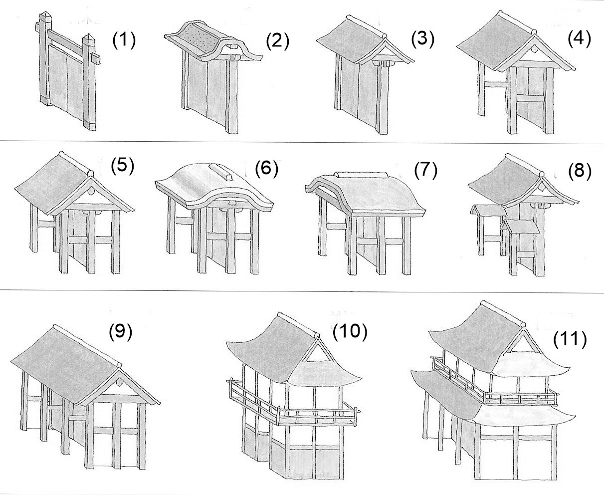 Japanische Tore